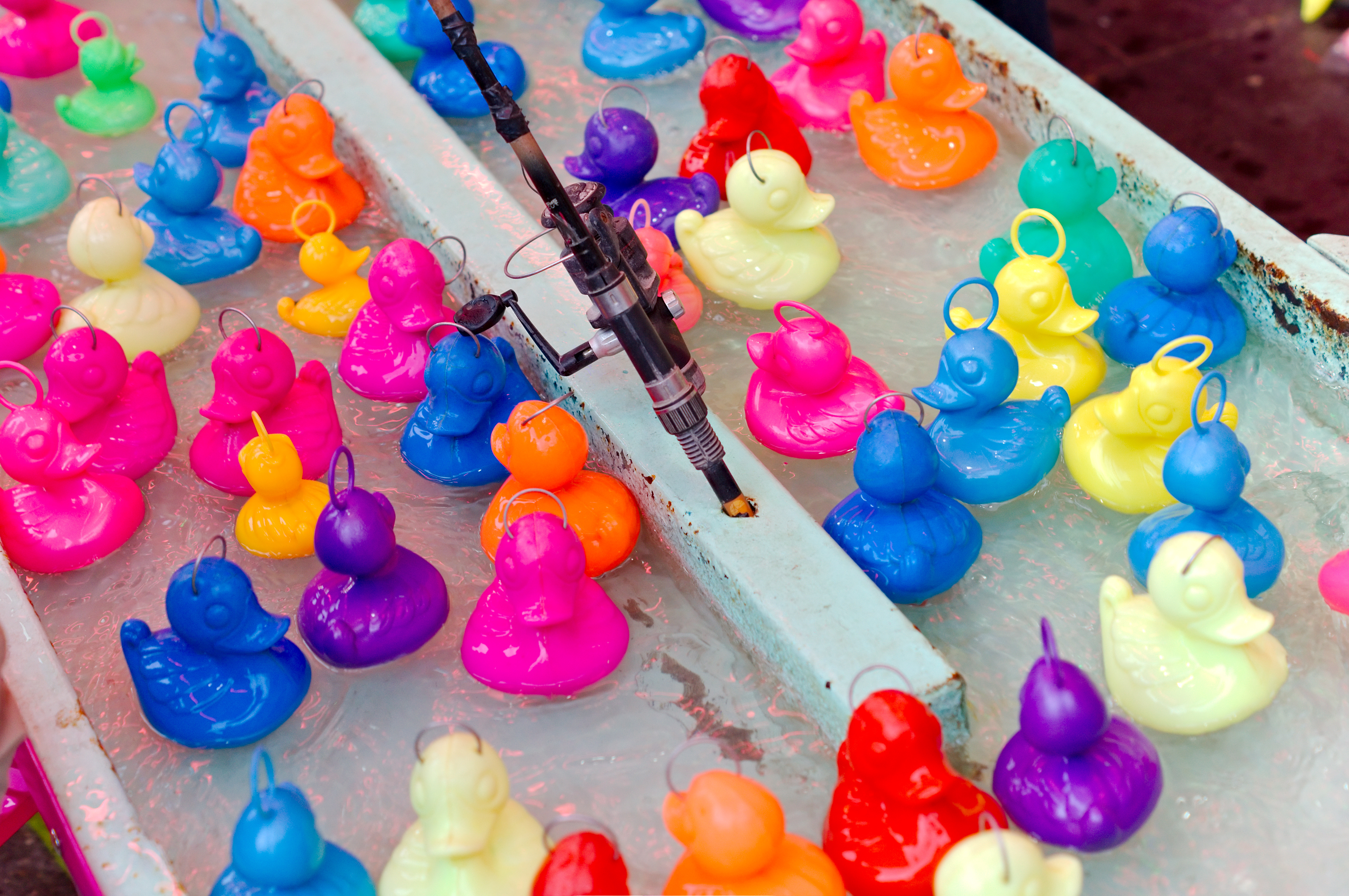 Stand de pêche aux canards à la Foire Saint-Romain 2014, quais bas rive gauche à Rouen